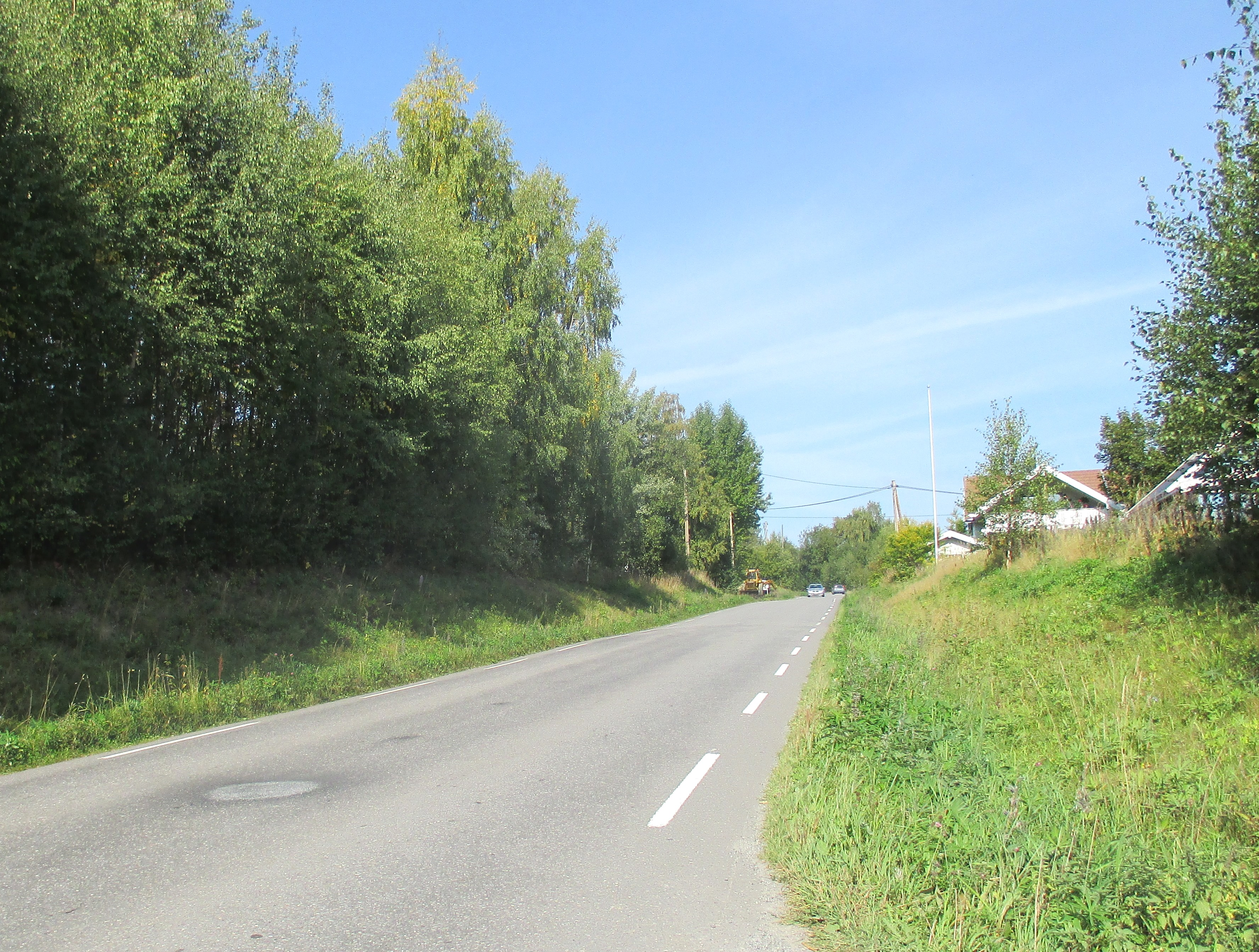 Fylkesvei 1680 like øst for FV1786 nord for Økelsrud